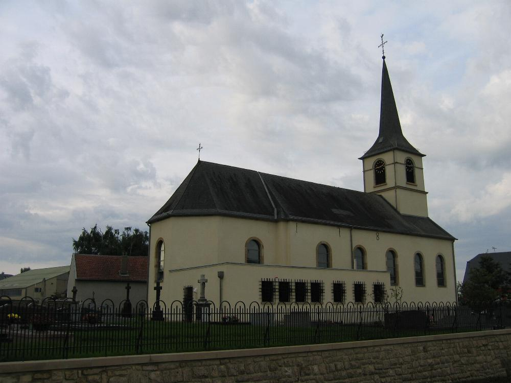 L'église de Contern (Luxembourg)